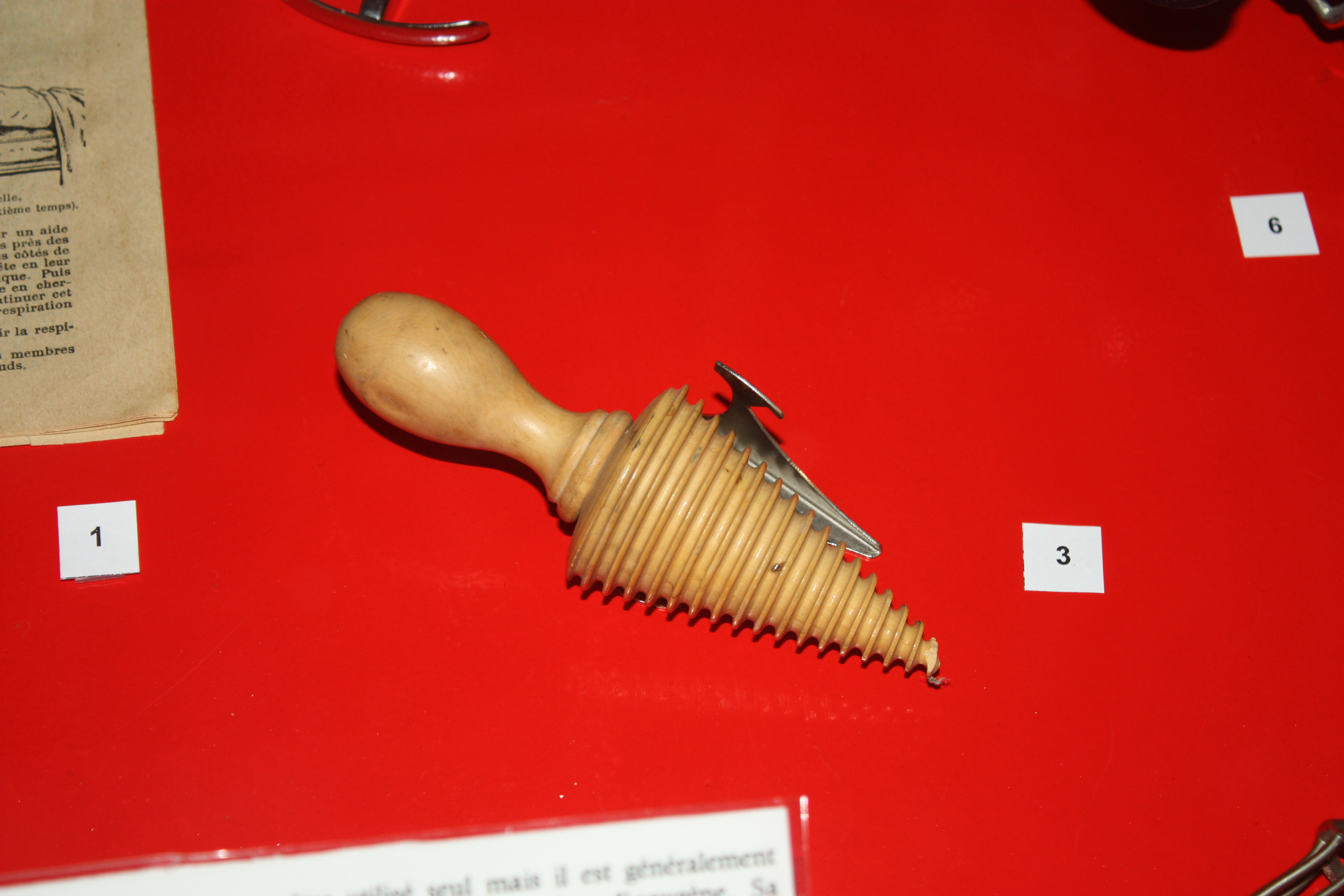 collection du Musée départemental des sapeurs pompiers d'Osny